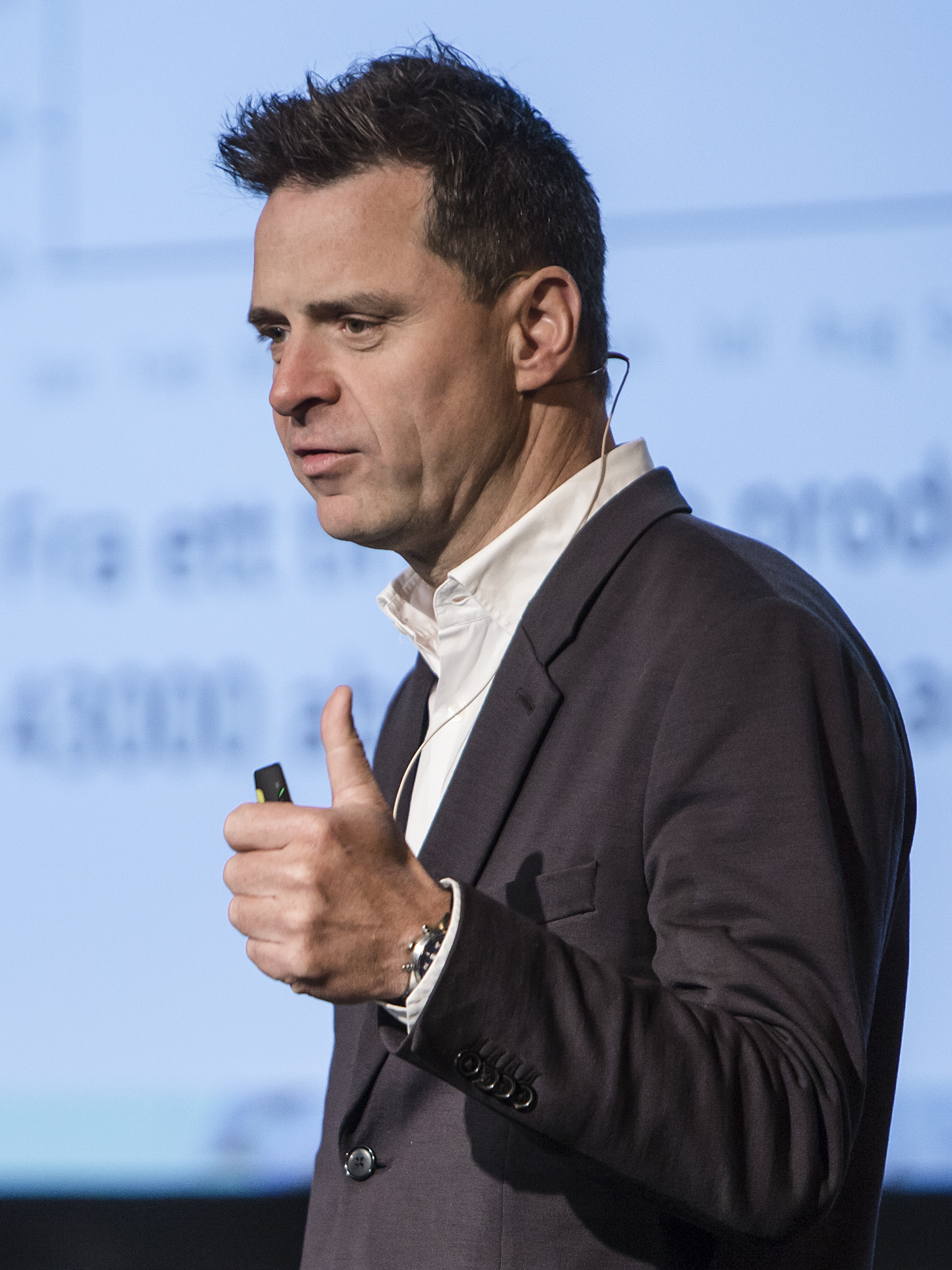 Espen Egil Hansen Foto: Jarle H. Moe /Nordiske Mediedager